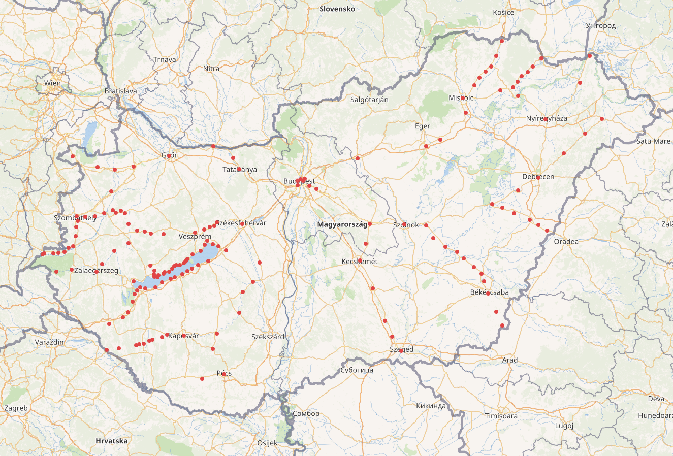 InterCity-állomások Magyarországon 2017 novemberében This map may be incomplete, and may contain errors. Don't rely solely on it for navigation.